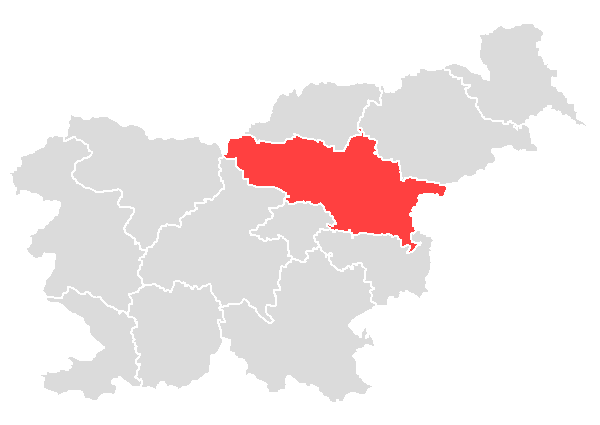 Savinjska statistična regija